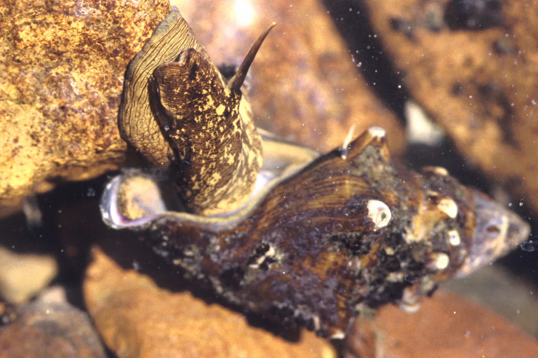 Io fluvialis